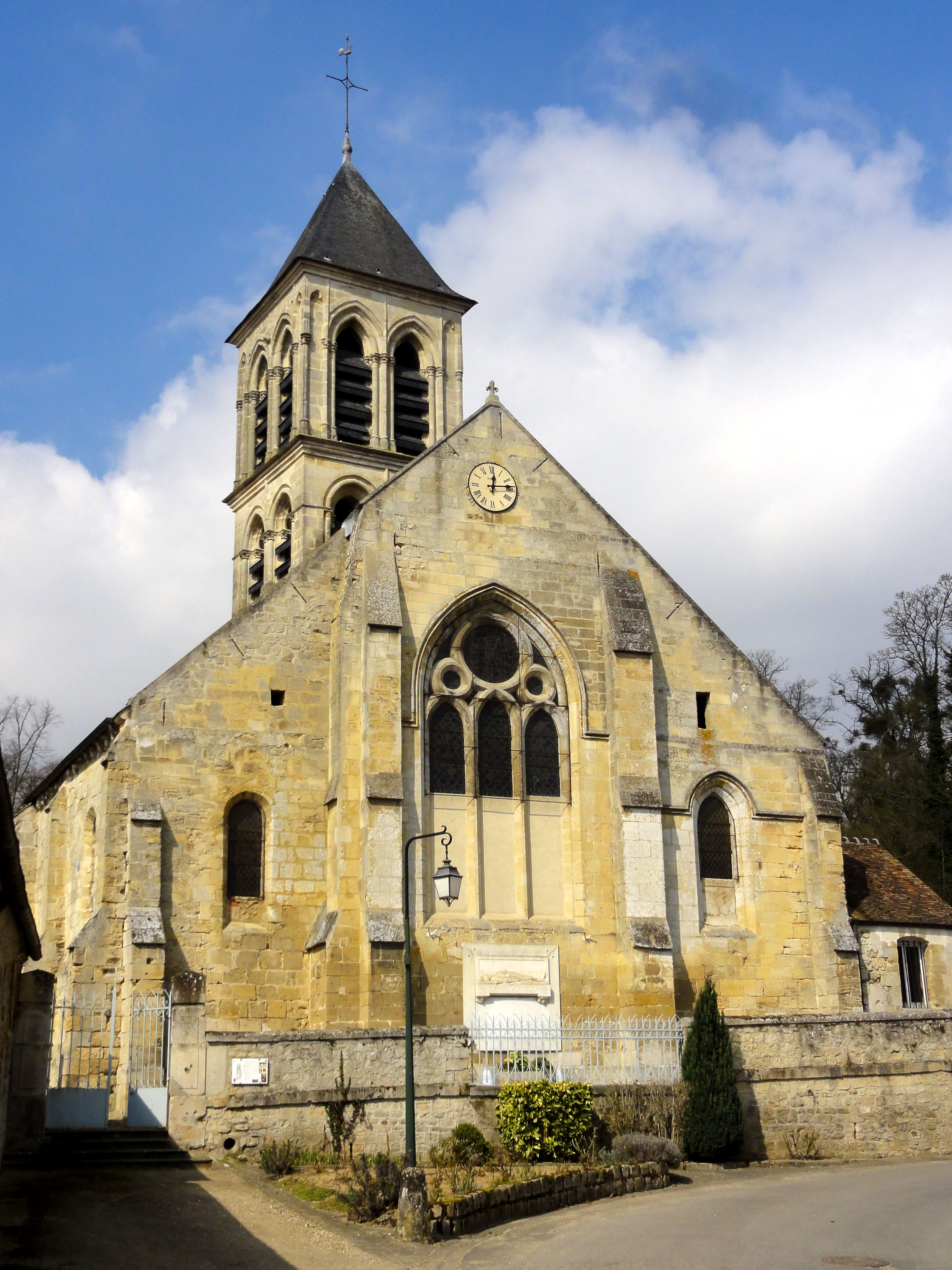 Façade du chevet.